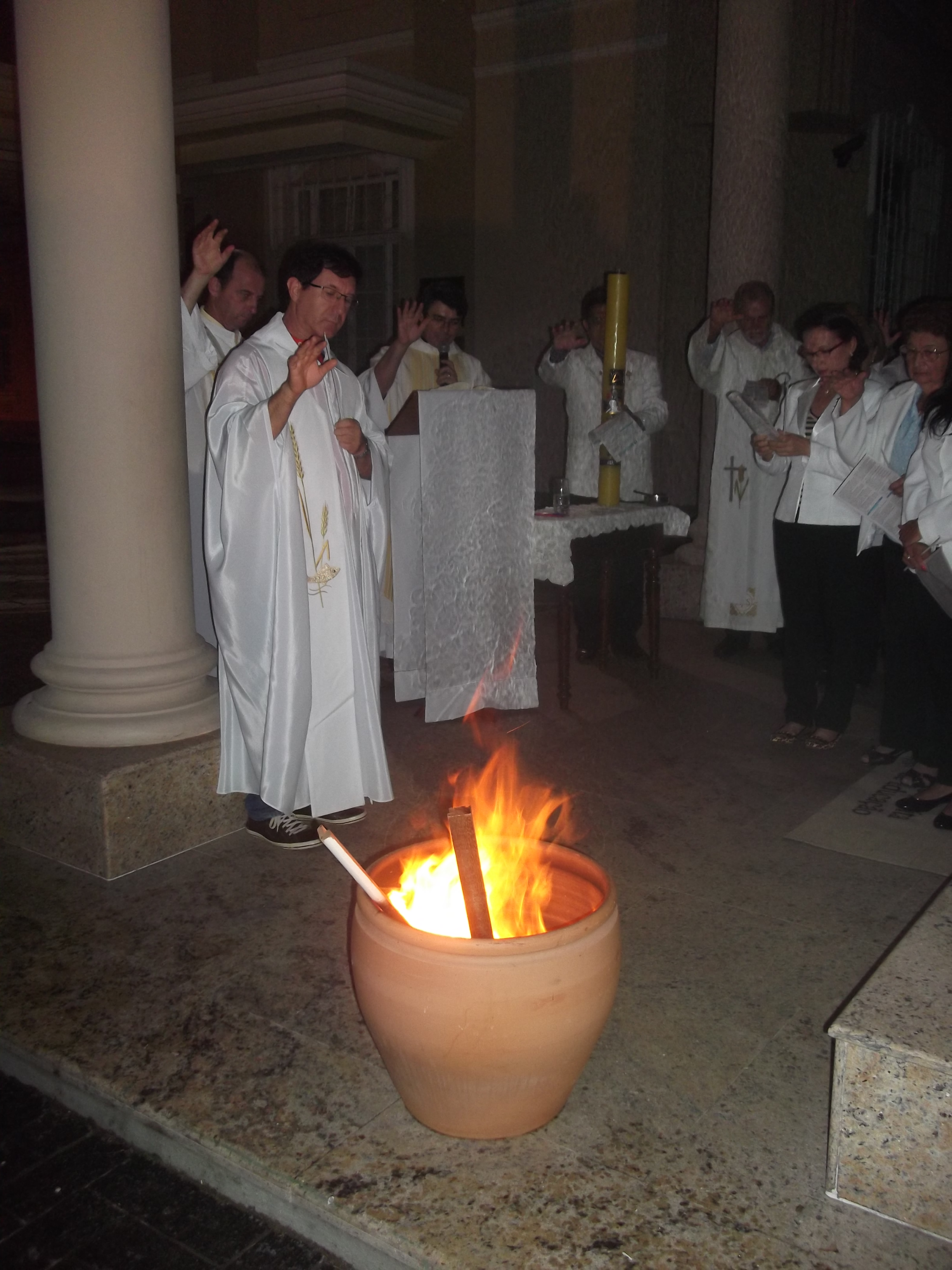 Igreja de Santa Catarina de Alexandria, Florianópolis, Brasil